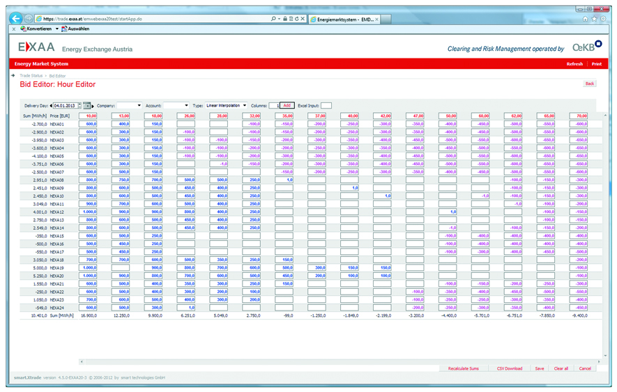 EXAA Wien